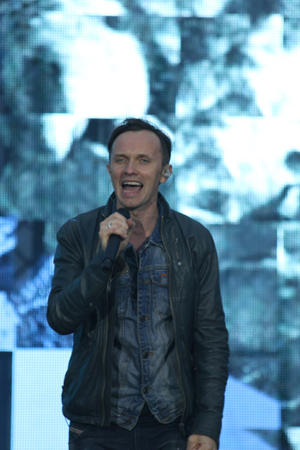 Renārs Kaupers dzied Jelgavā 20150725 Foto: Raitis Freimanis